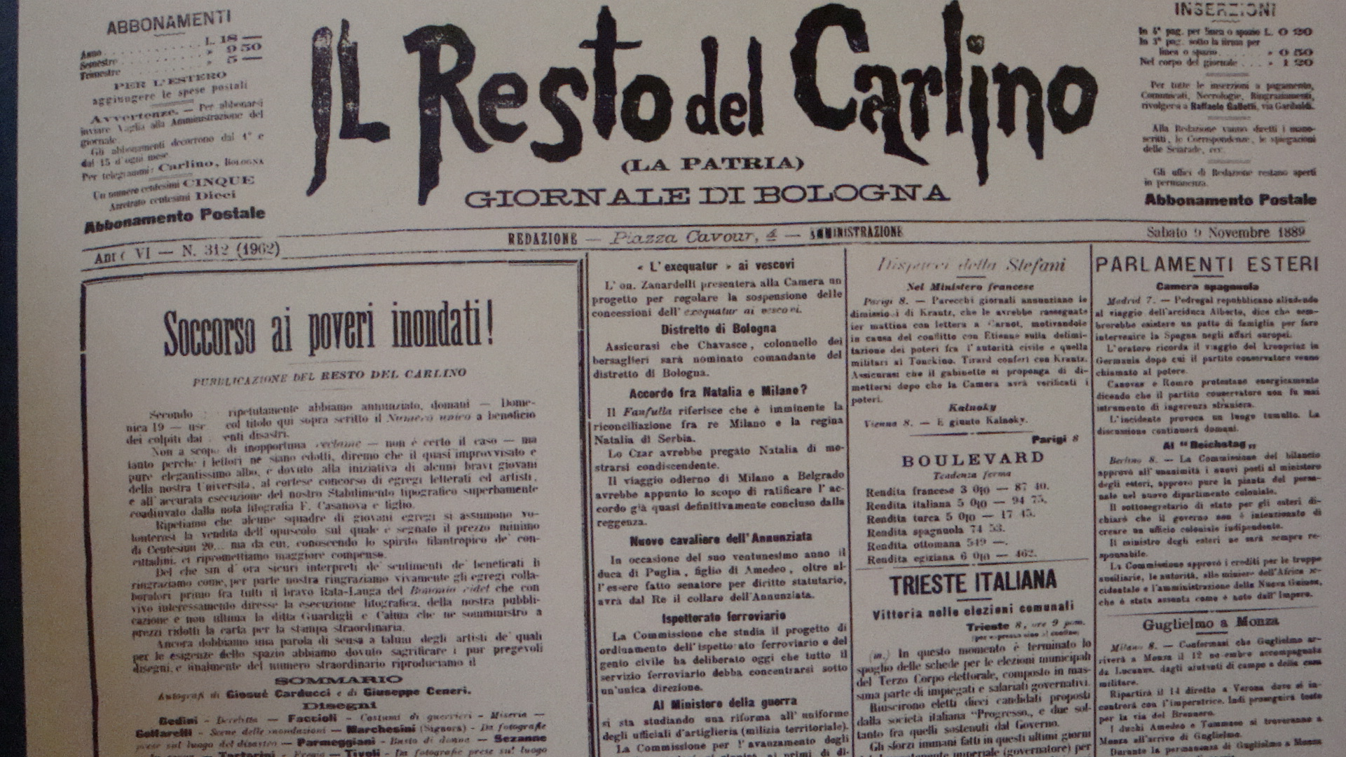 Prima pagina de il Resto del Carlino del 9 novembre 1889 (Anno VI).